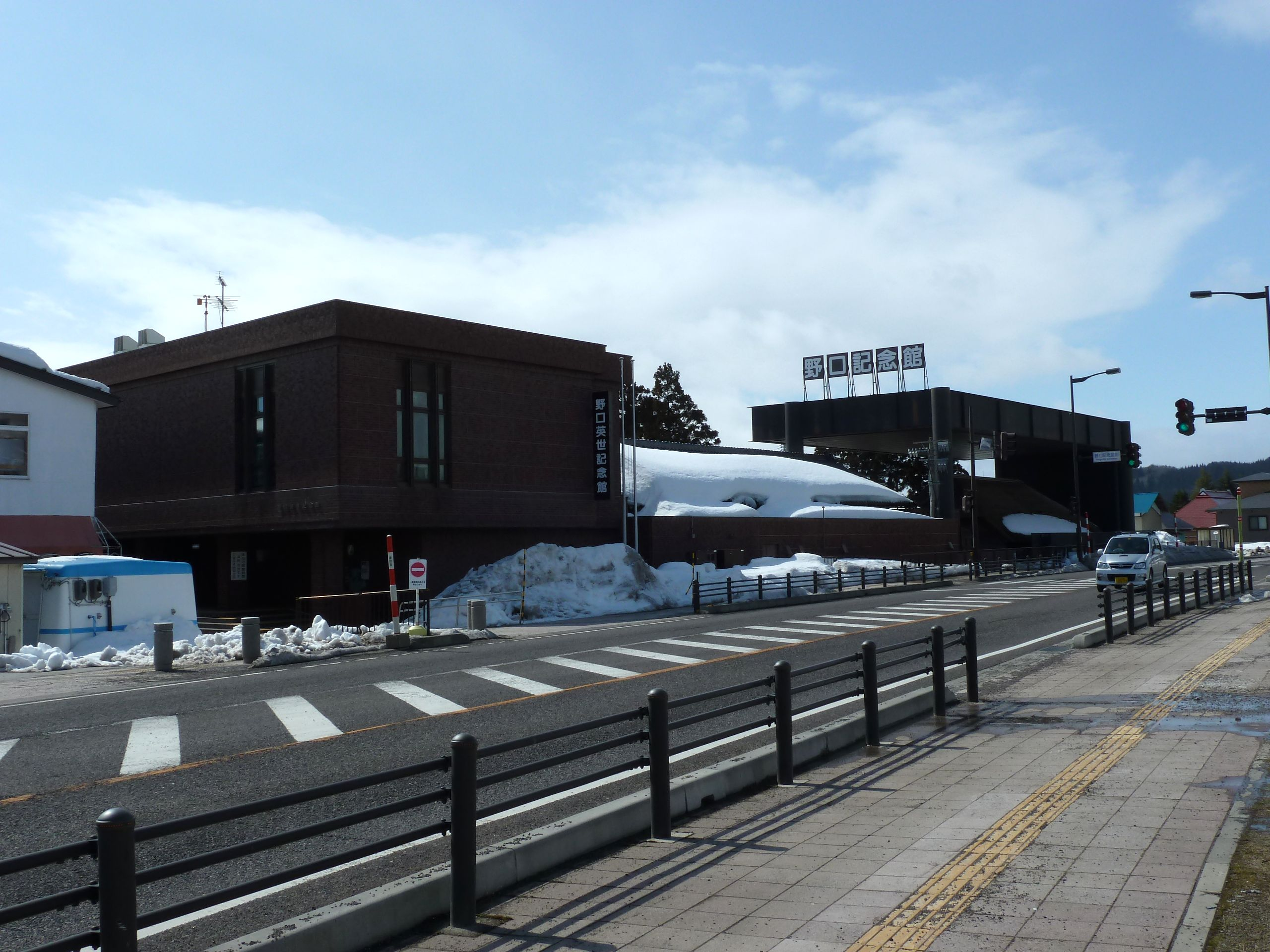 野口英世記念館